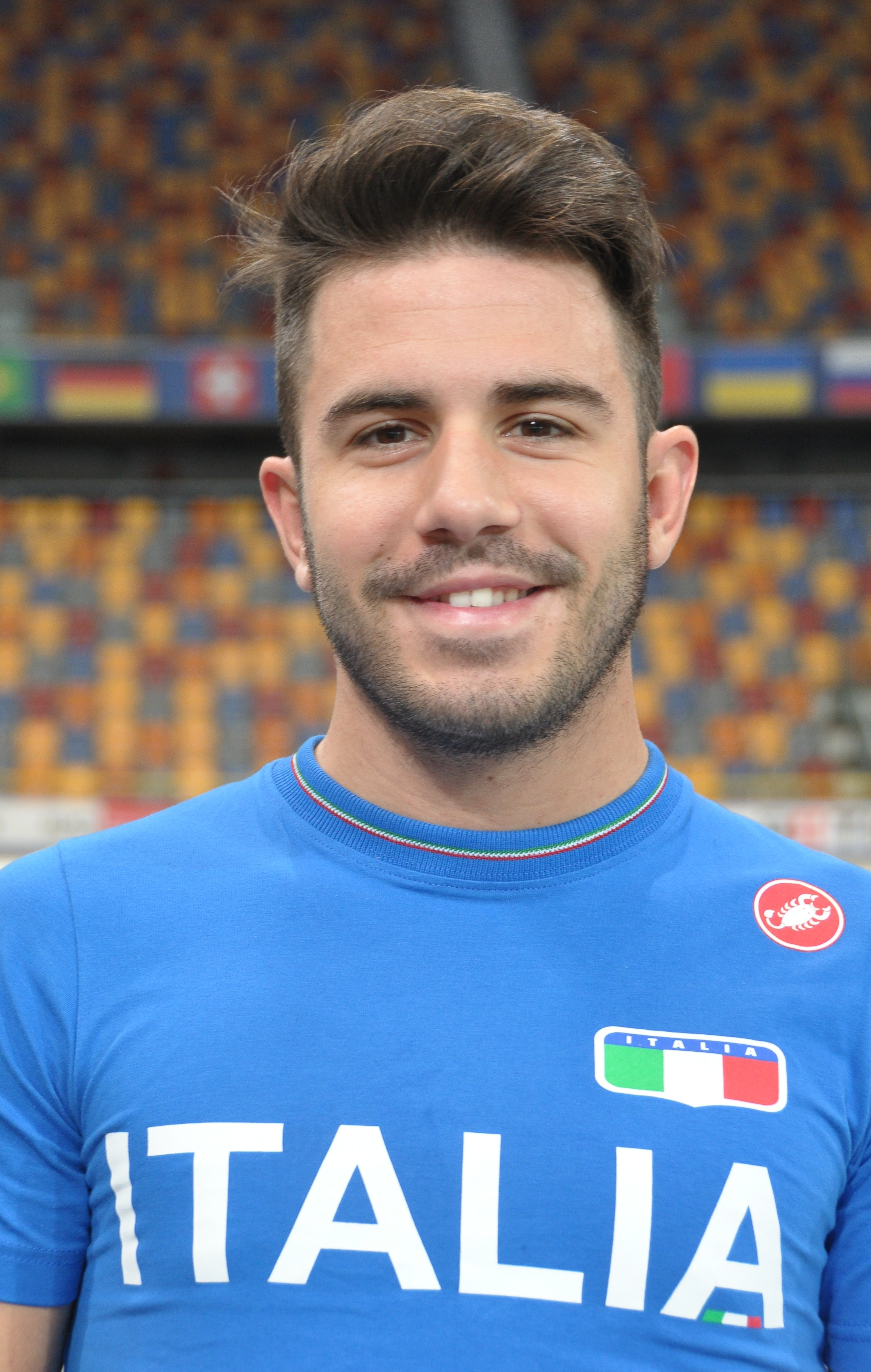 Francesco Lamon, italienischer Radsportler